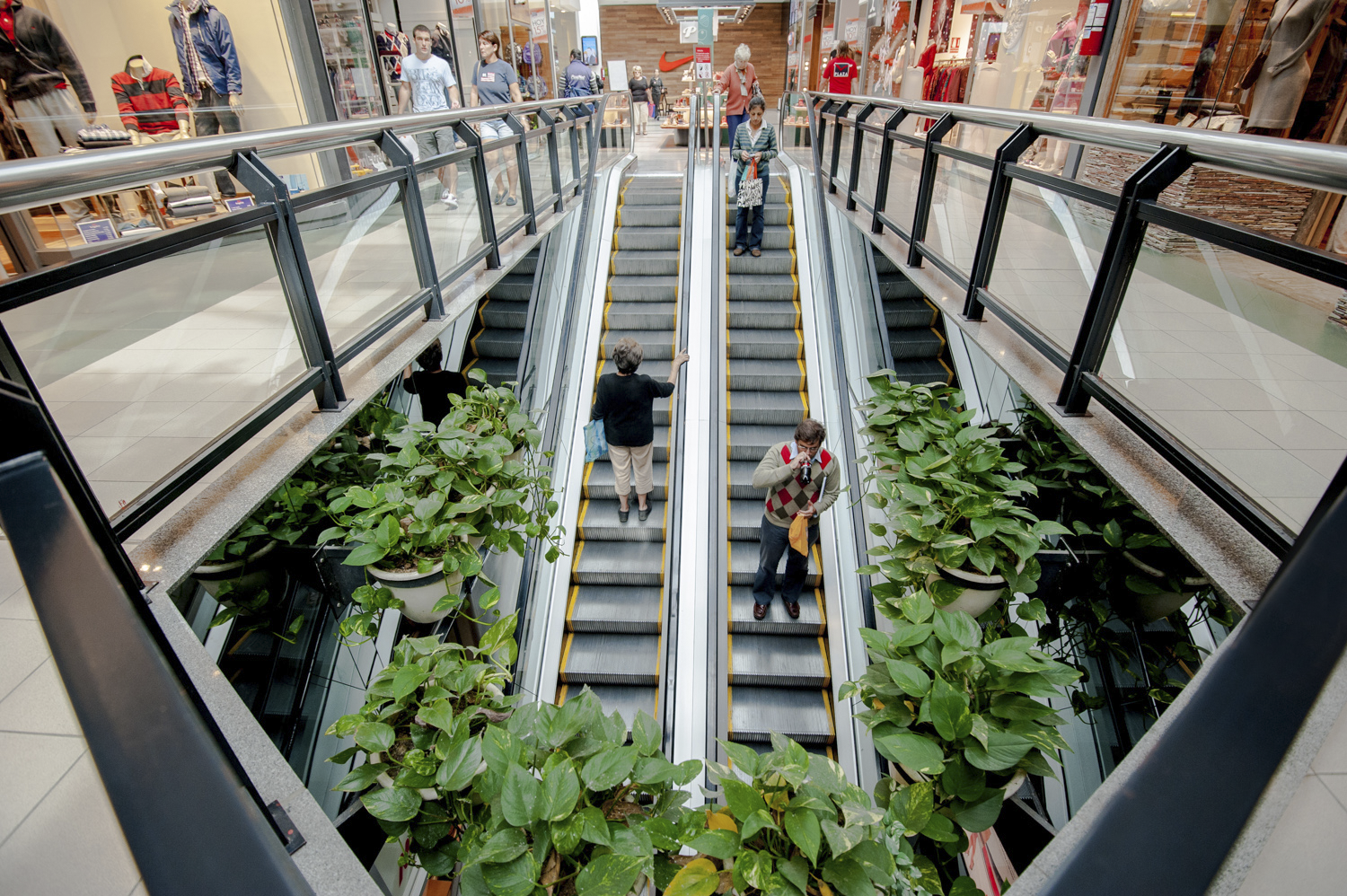 Escaleras al segundo piso en Portones Shopping